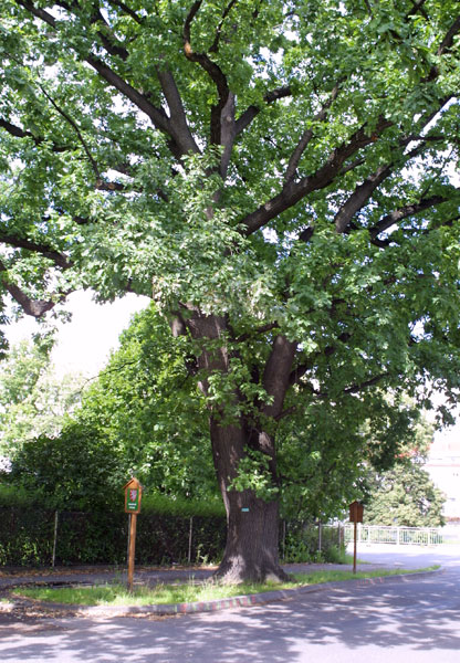 Památný strom Dub v Klatovech.